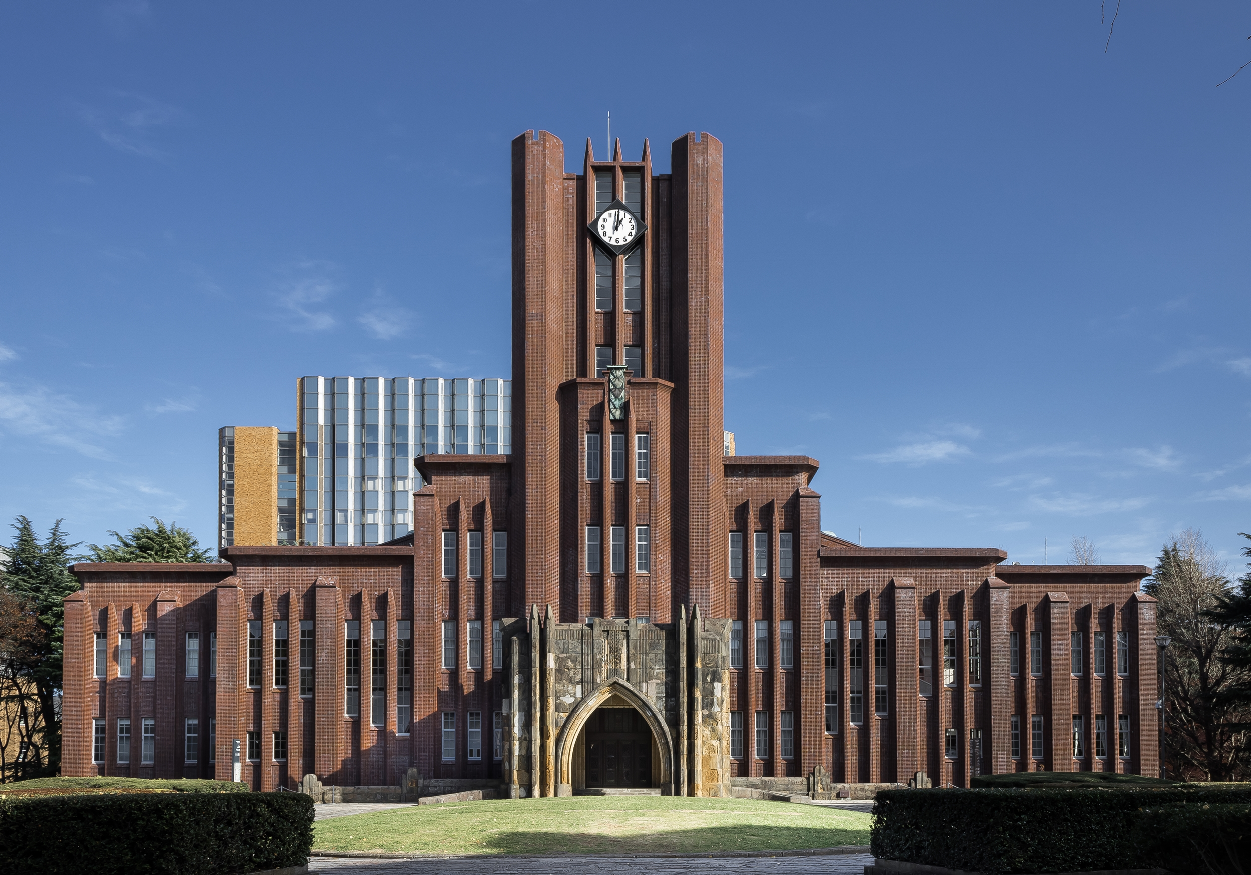 東京大学安田講堂、内田祥三（1925年）。